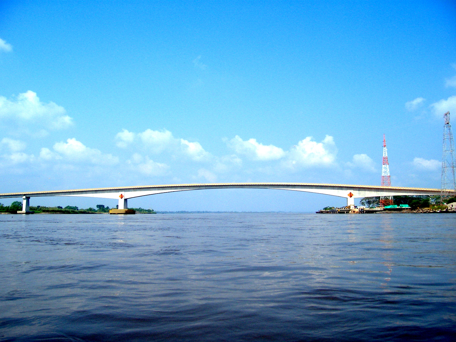 Puente que une el Departamento Antioquia con Santander en Barrancabermeja.